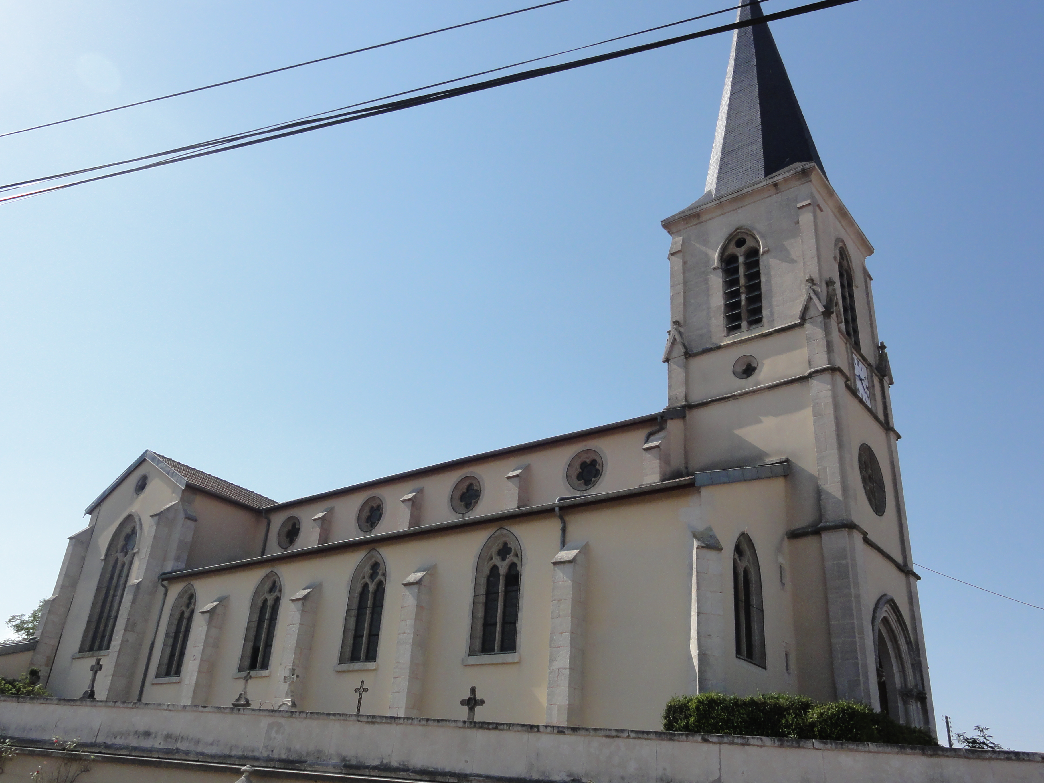 Béthelainville (Meuse) église